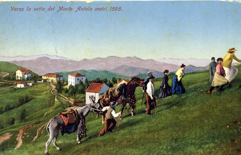 VersoAntolainizi900